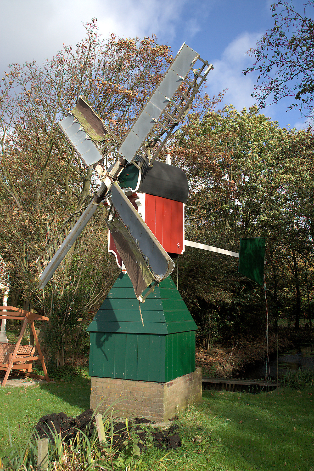 Windmill Faljeril